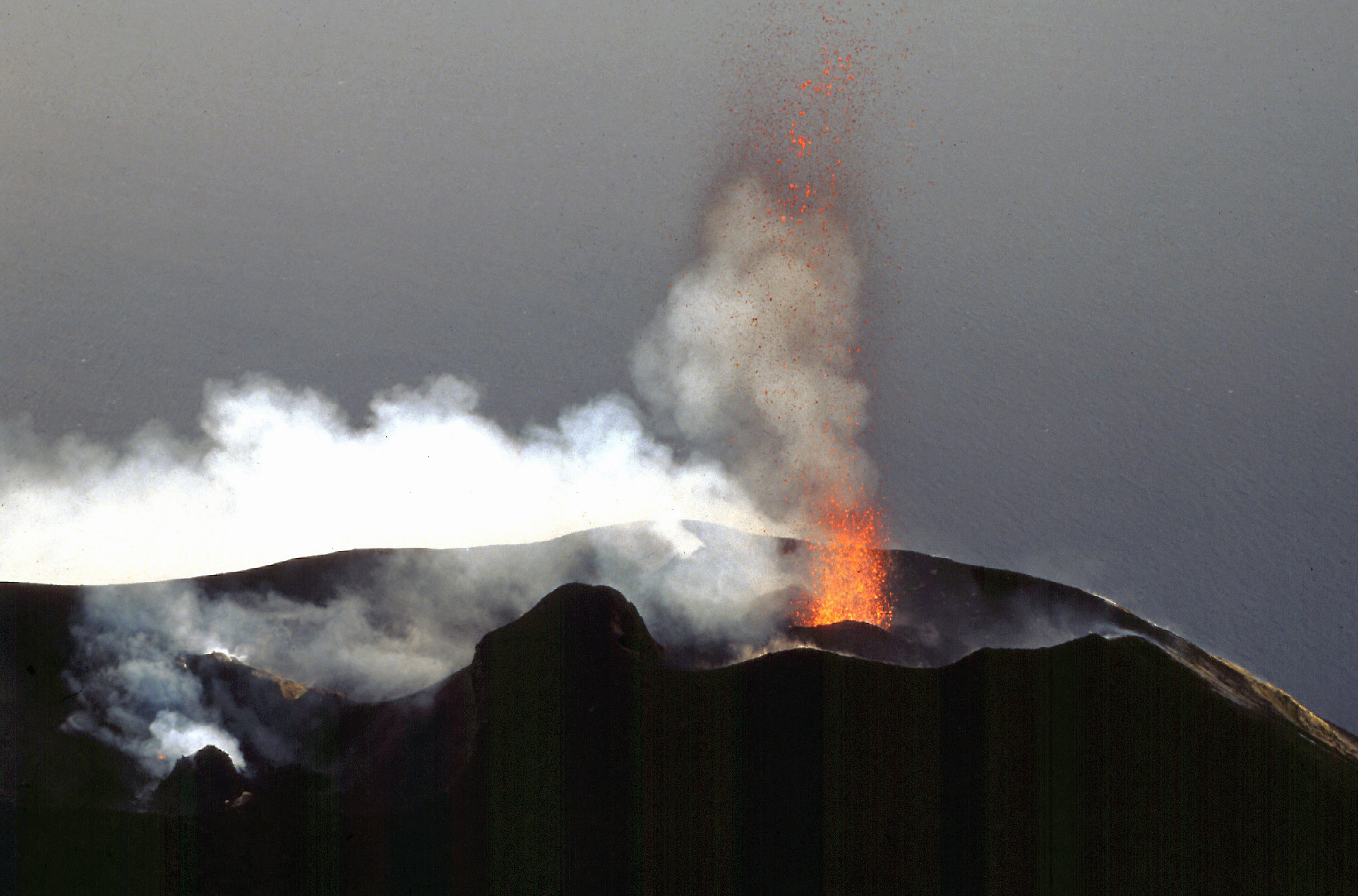 Strombolianische Eruption am Stromboli (Okt. 1990)